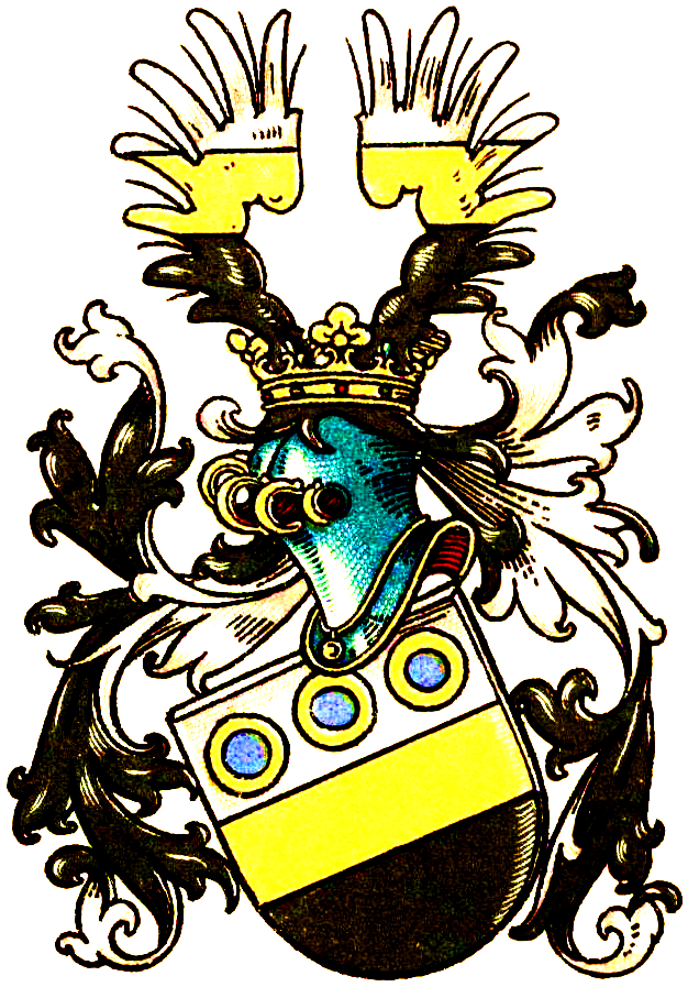 Stammwappen der von Scheidt genannt Weschpfennig